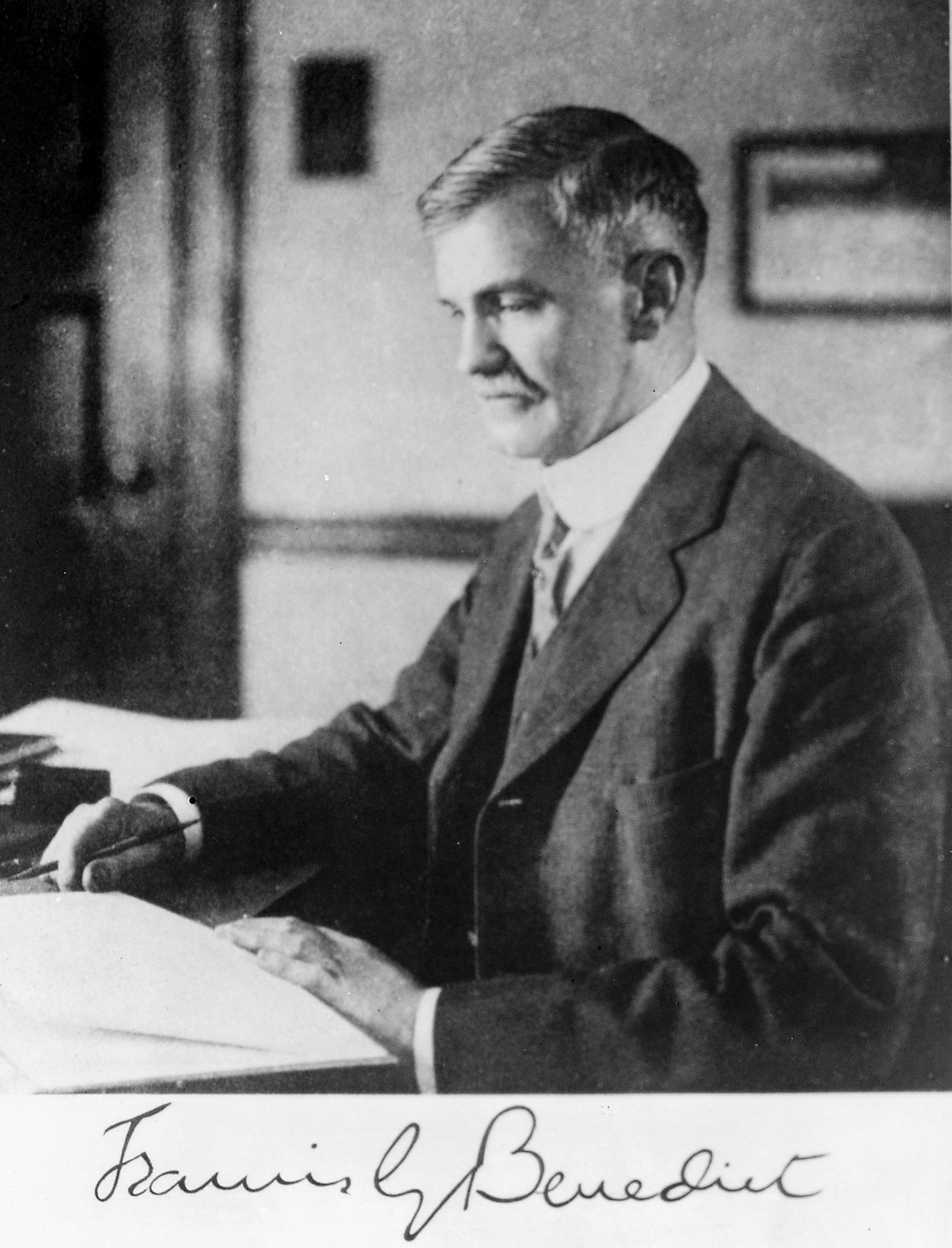 Francis Gano Benedict